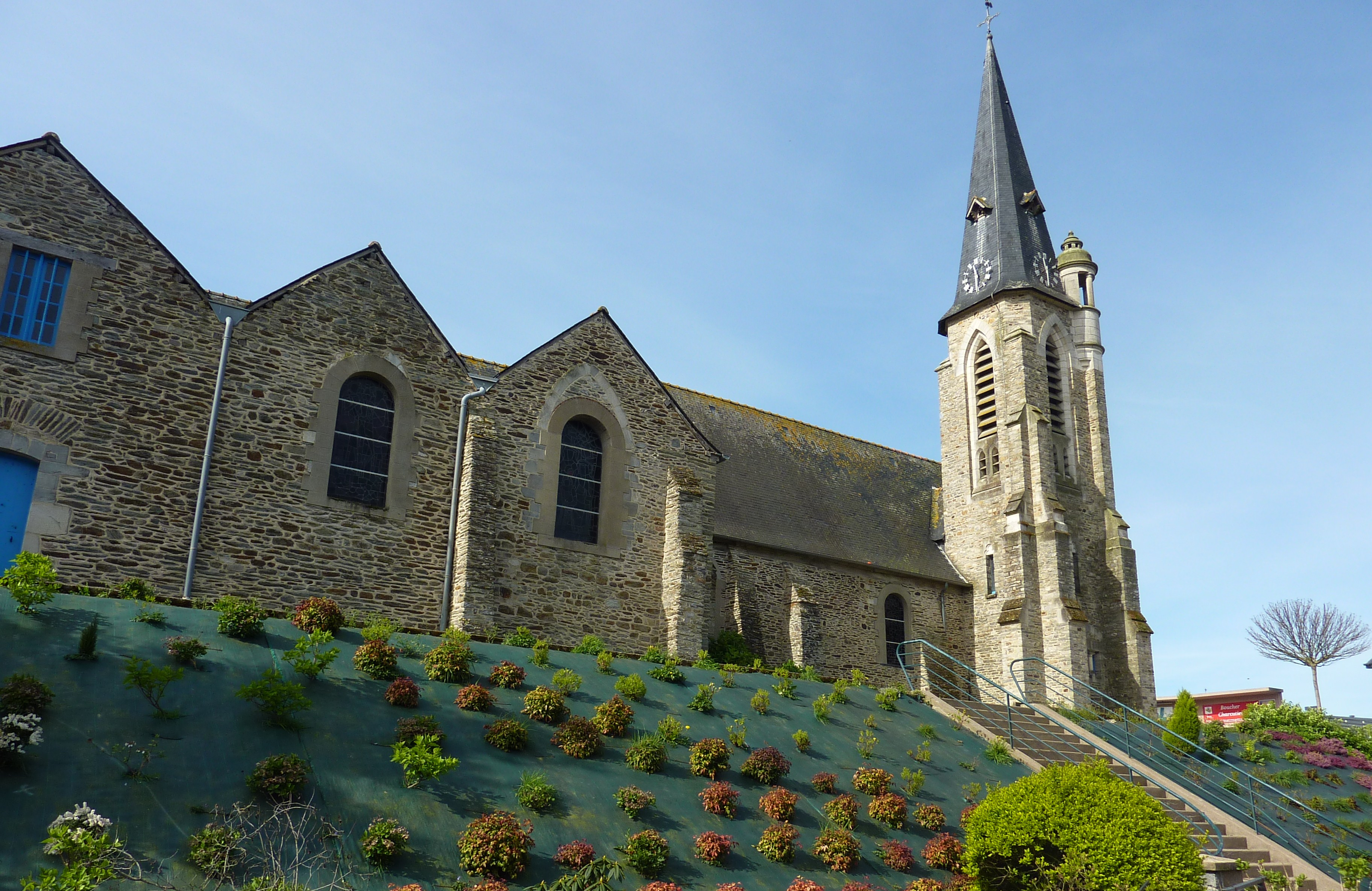 Saint-Didier : l'église paroissiale vue du nord et la butte, partiellement arasée et confortée par un muret de pierres, qui portait l'ancien cimetière.